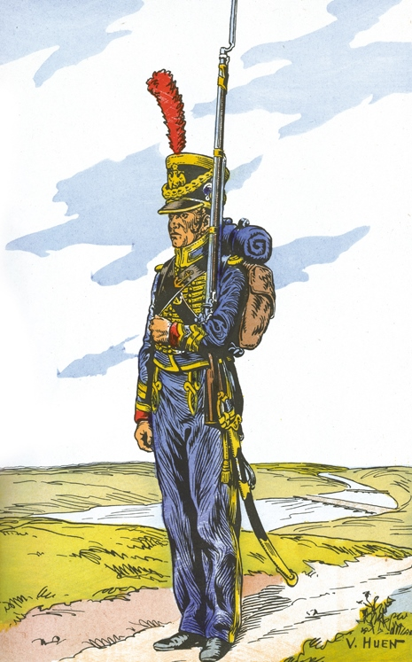 Quartier-maître des marins de la Garde impériale.